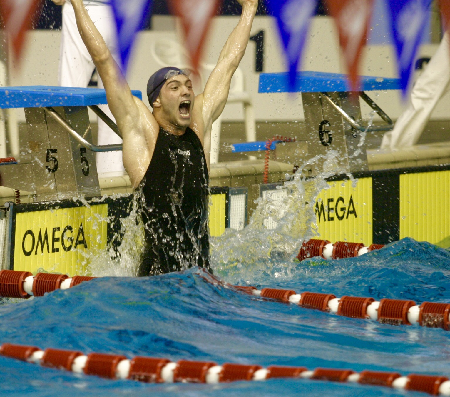 Javier Noriega Sanz (23 de julio de 1980 – Toledo), Cádiz en marzo del 2004.